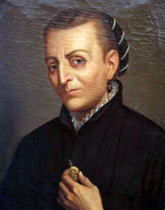 Doña Josefa Teresa de Busto y Moya Xeres y Monroy.